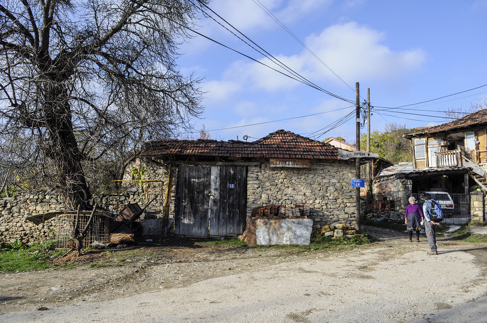 На чистинката среде Горно Соње.